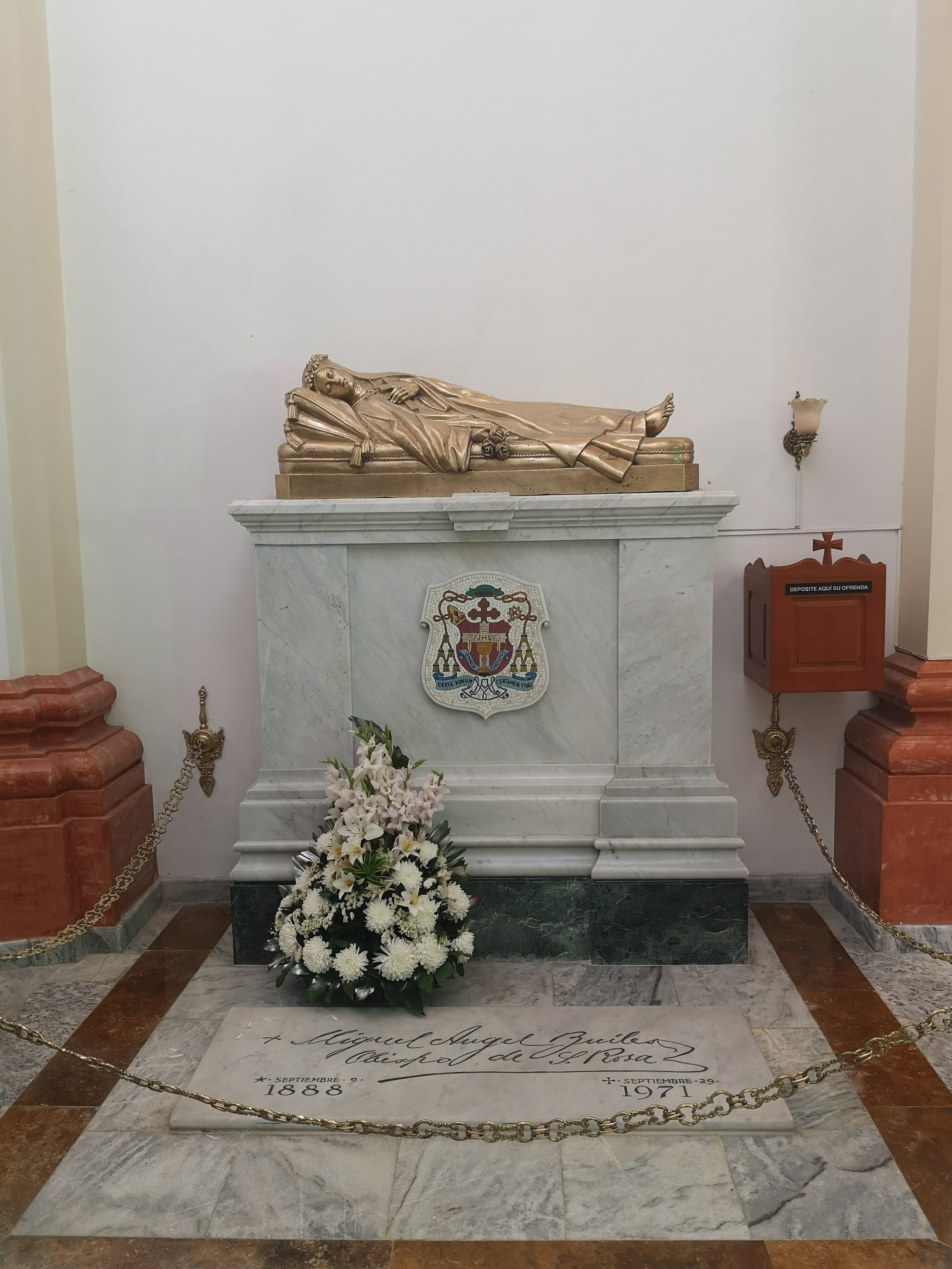 Catedral de Santa Rosa de Osos - Miguel Ángel Builes